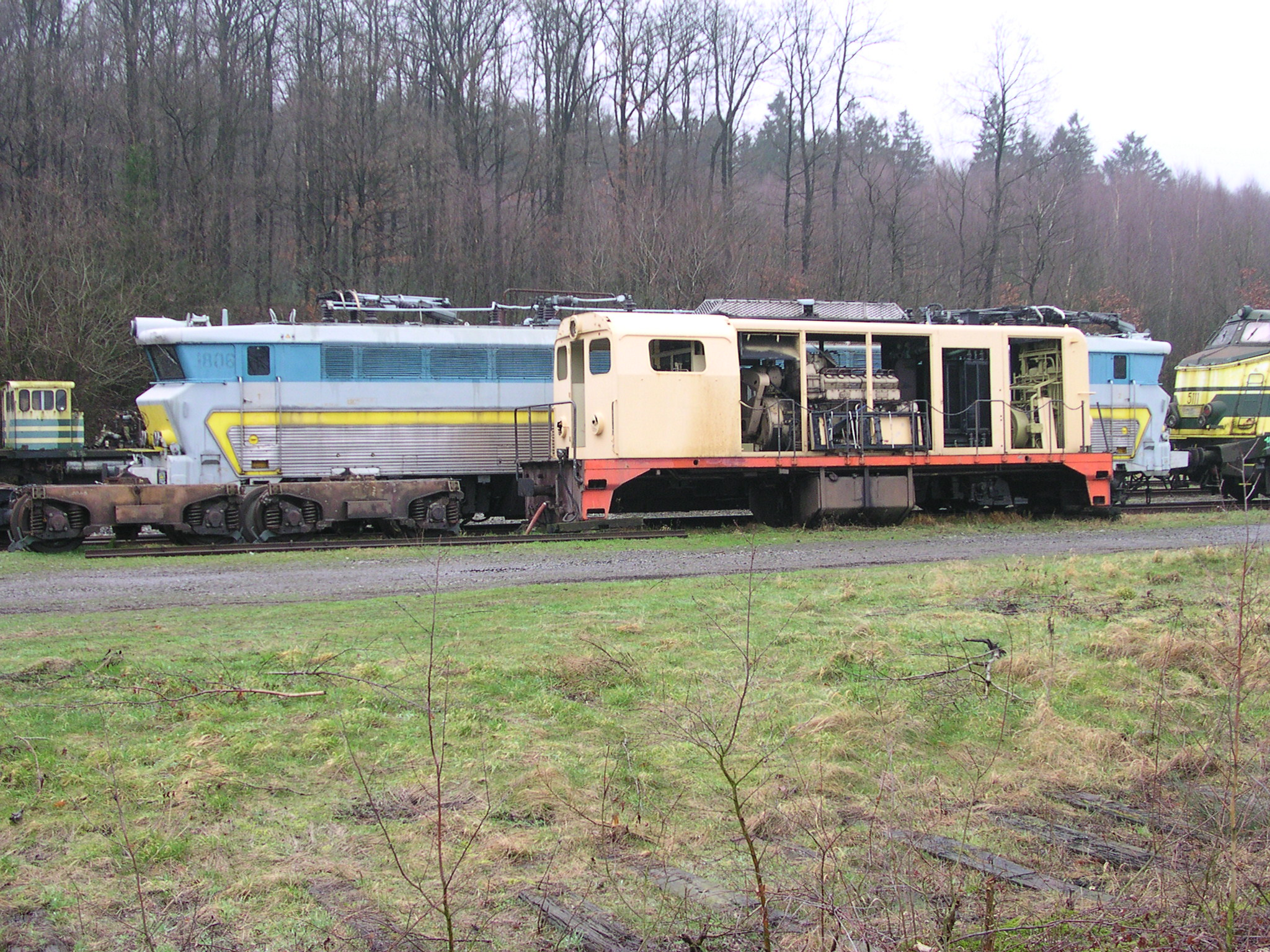 Abgestellte Lokomotiven am Bahnhof Raeren